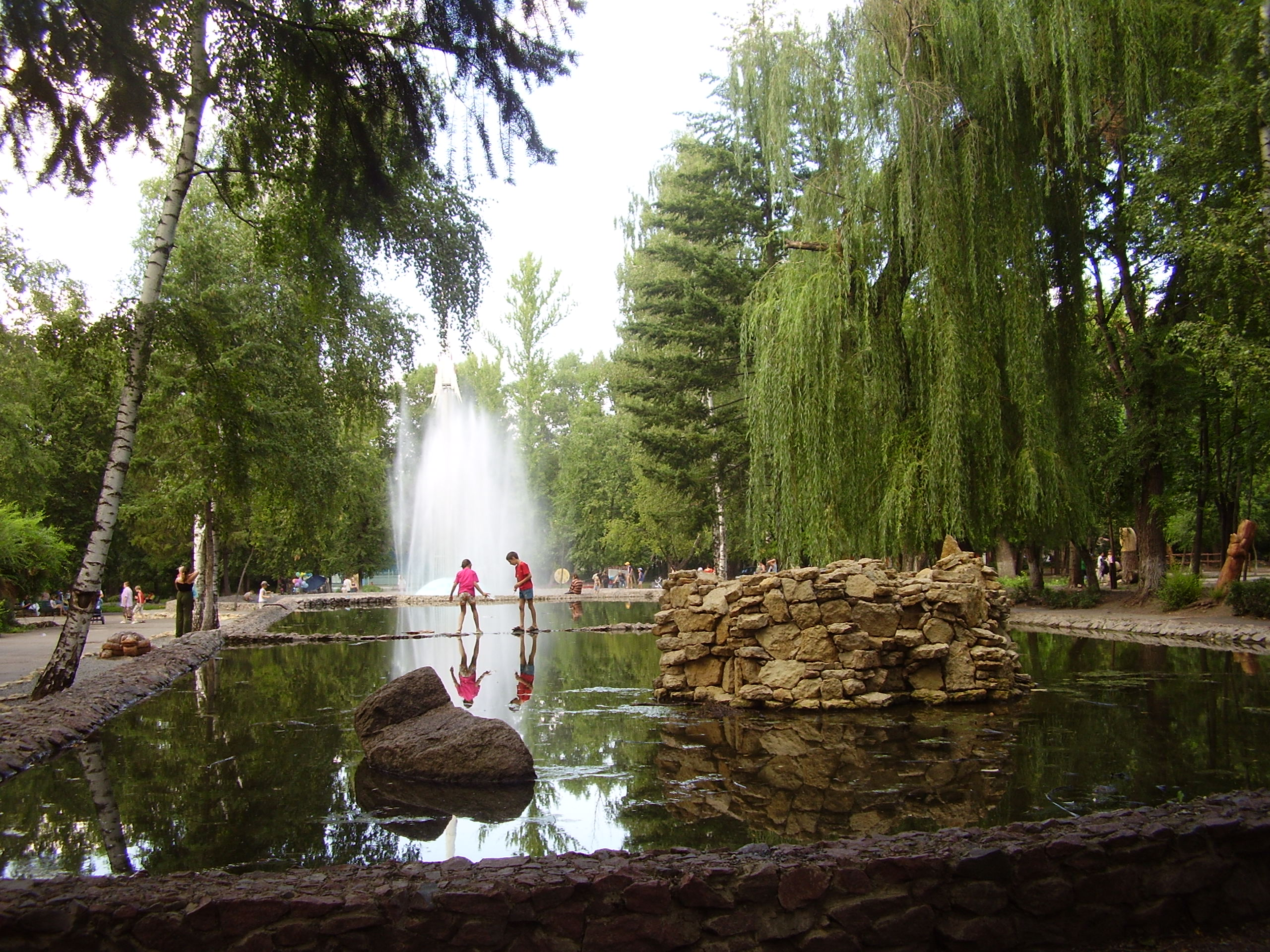 Воронеж,в парке Авиастроителей на Левом берегу